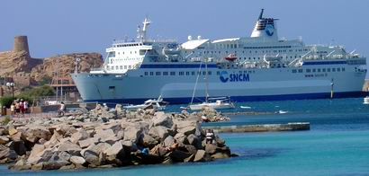 Ferry Corse de la SCNM au port de l'Île-Rousse (photo de vacances de Michel Buze, sous licence GFDL) Michel Buze